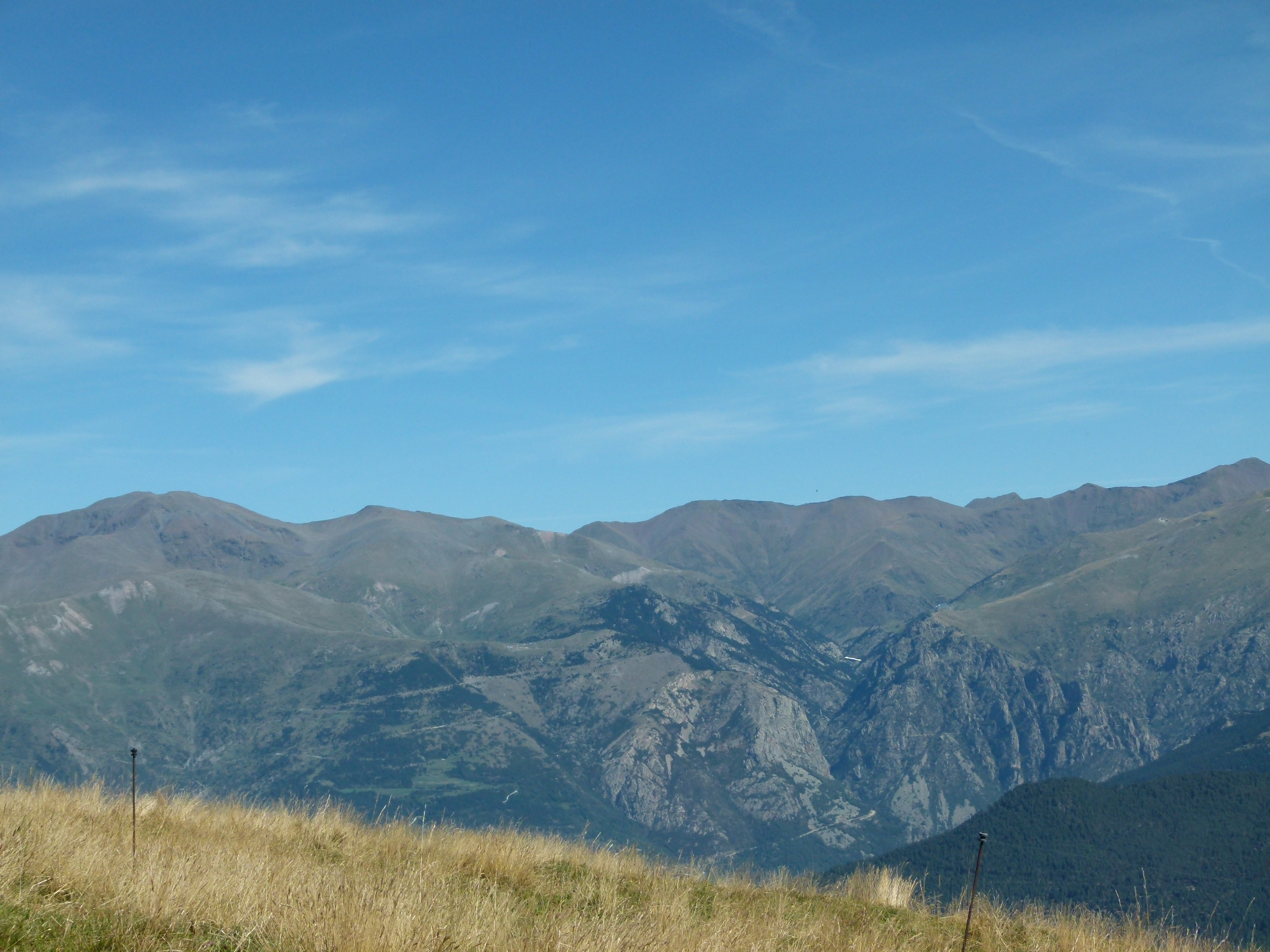 D'esquerra a dreta, vist des del Taga: Puigmal, Fontalba, Gorges de Núria, Roques de Totlomón